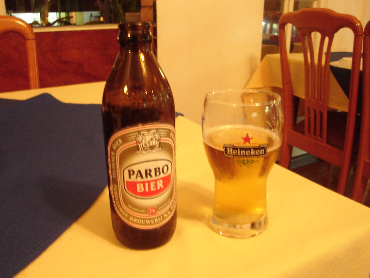 Bierflesje Parbo bier en een glas Heineken, foto eigen werk Solaris010